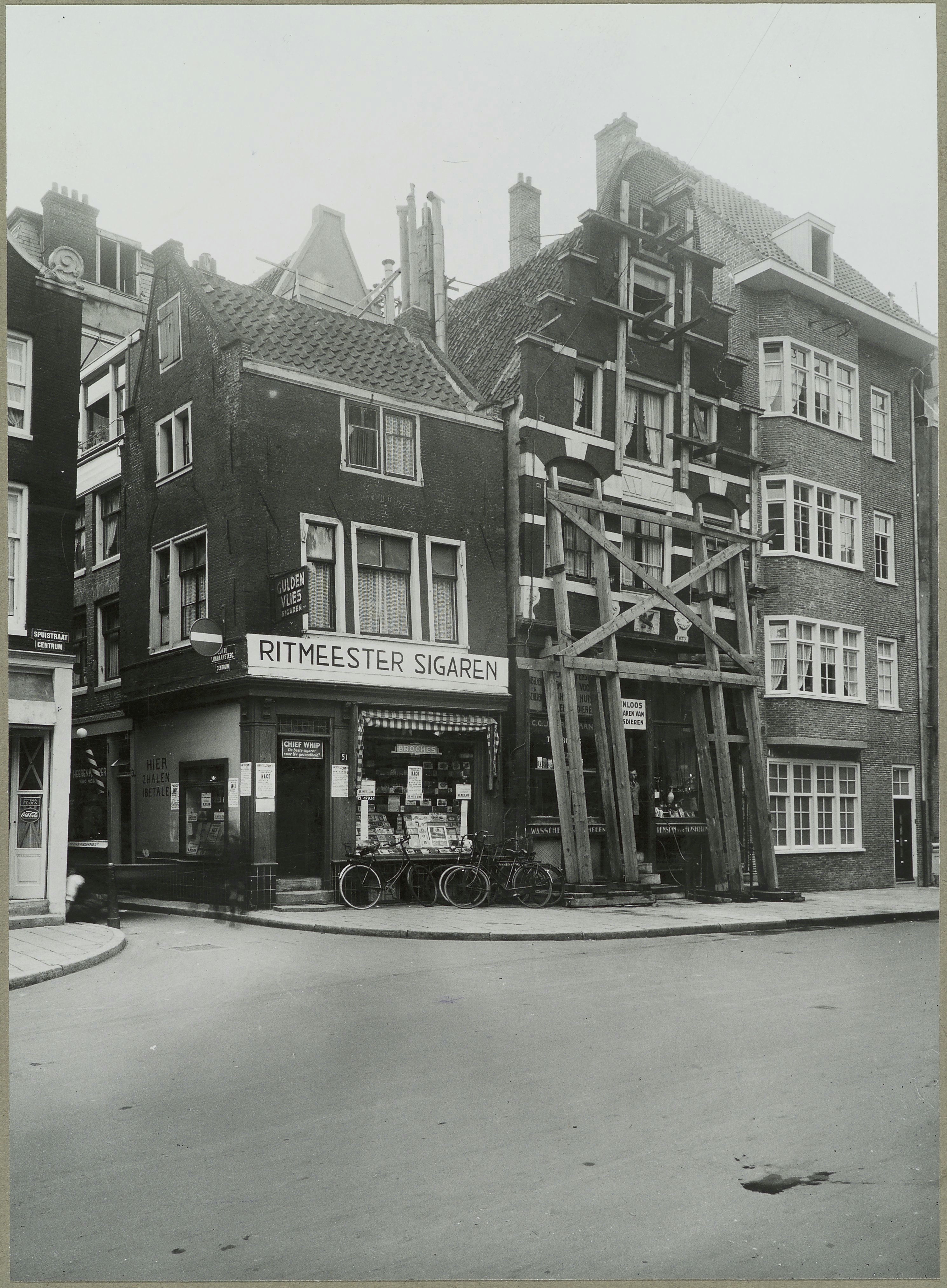 Gevel/ Stut: Zicht op een gestutte gevel in gevelwand (opmerking: Bijschrift: Beh b brief v.d. Dir v.h. Gem Bouw- en Woningtoez dd. 10-9-40 no 2531 Aa Bd '40)